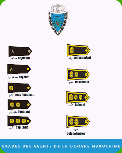 رتب ودرجات أعوان إدارة الجمارك والضرائب غير المباشرة المغربية